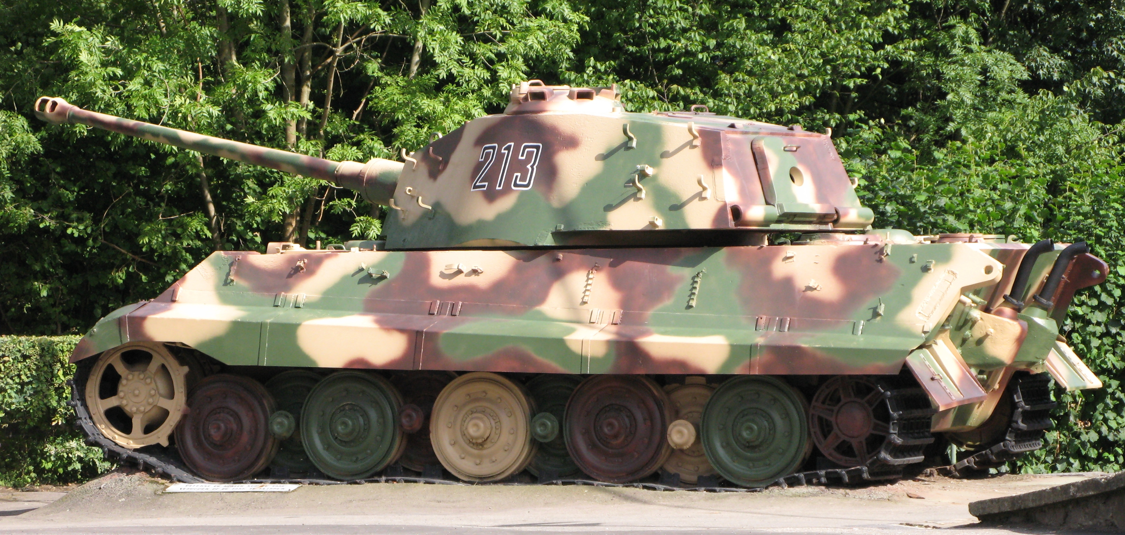 Tigre II a La Gleize (Belgique)